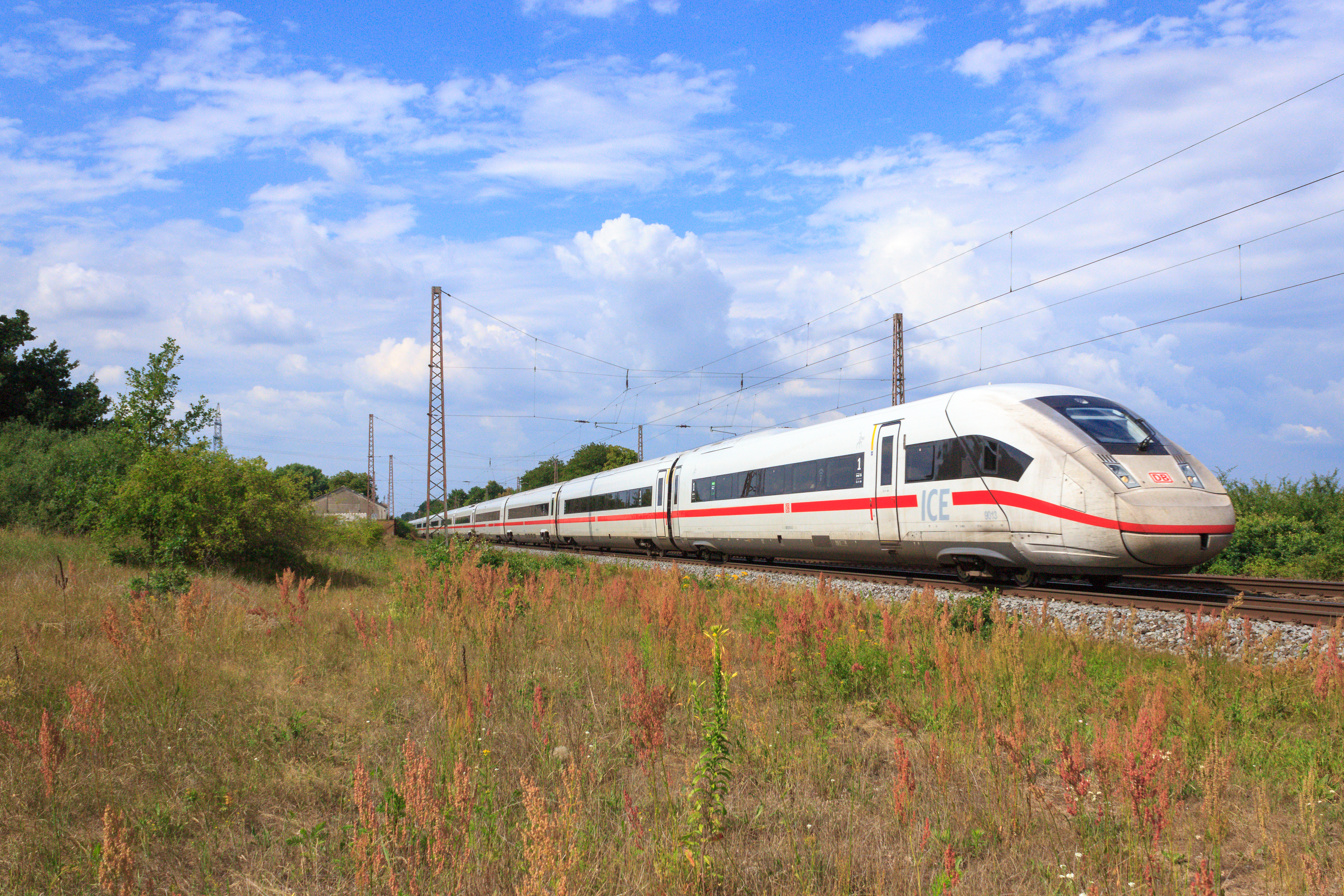 Aufgrund von Bauarbeiten an der Stecke zwischen Hamburg und Hannover fahren auch die ICEs der neuesten Baureihe 412 über Verden. Dieses Foto wurde am 12.07.2018 in Wahnebergen aufgenommen während der ICE (Zugnummer leider Unbekannt) Richtung Nienburg fuhr.